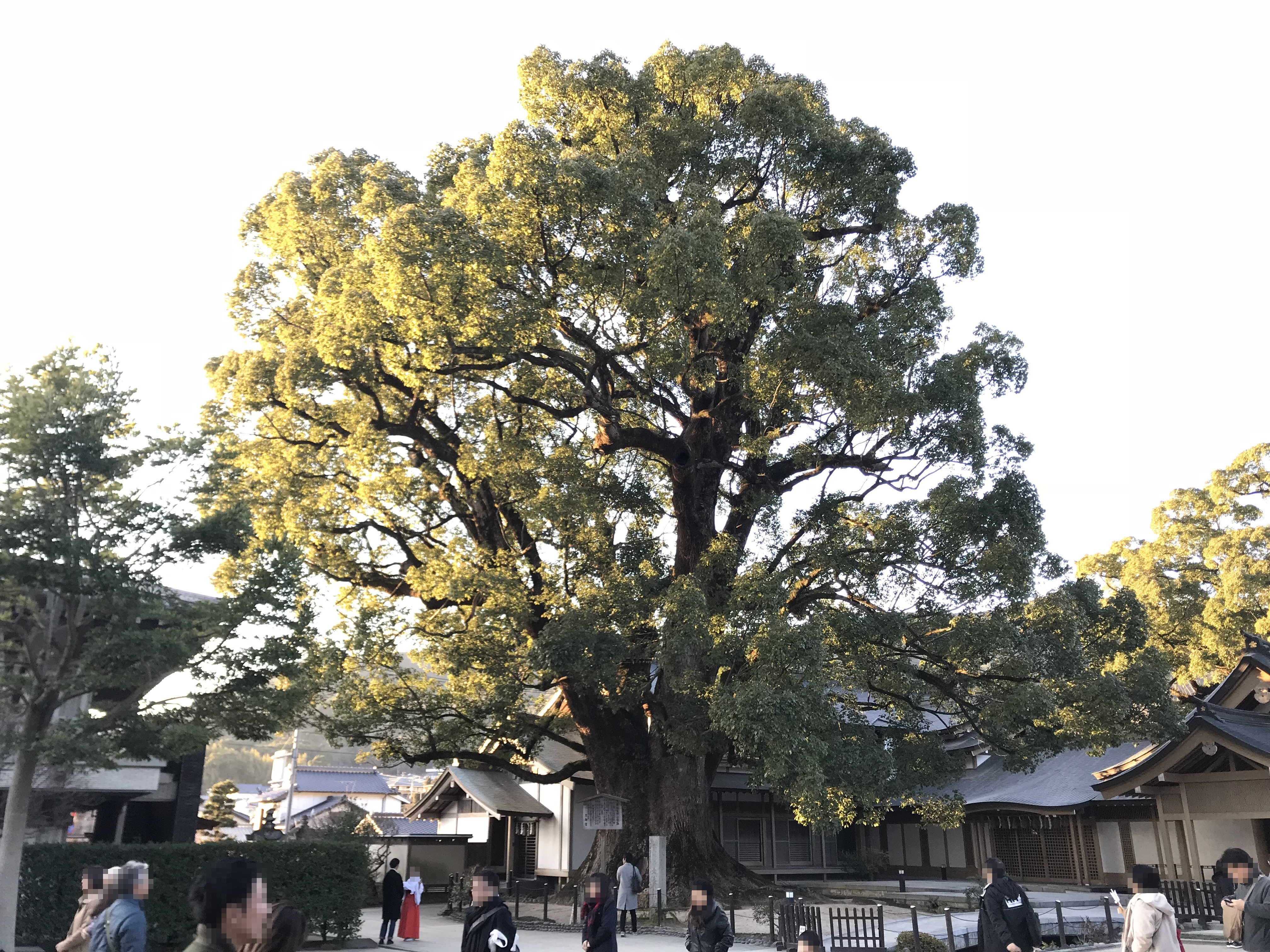 太宰府天満宮の大楠